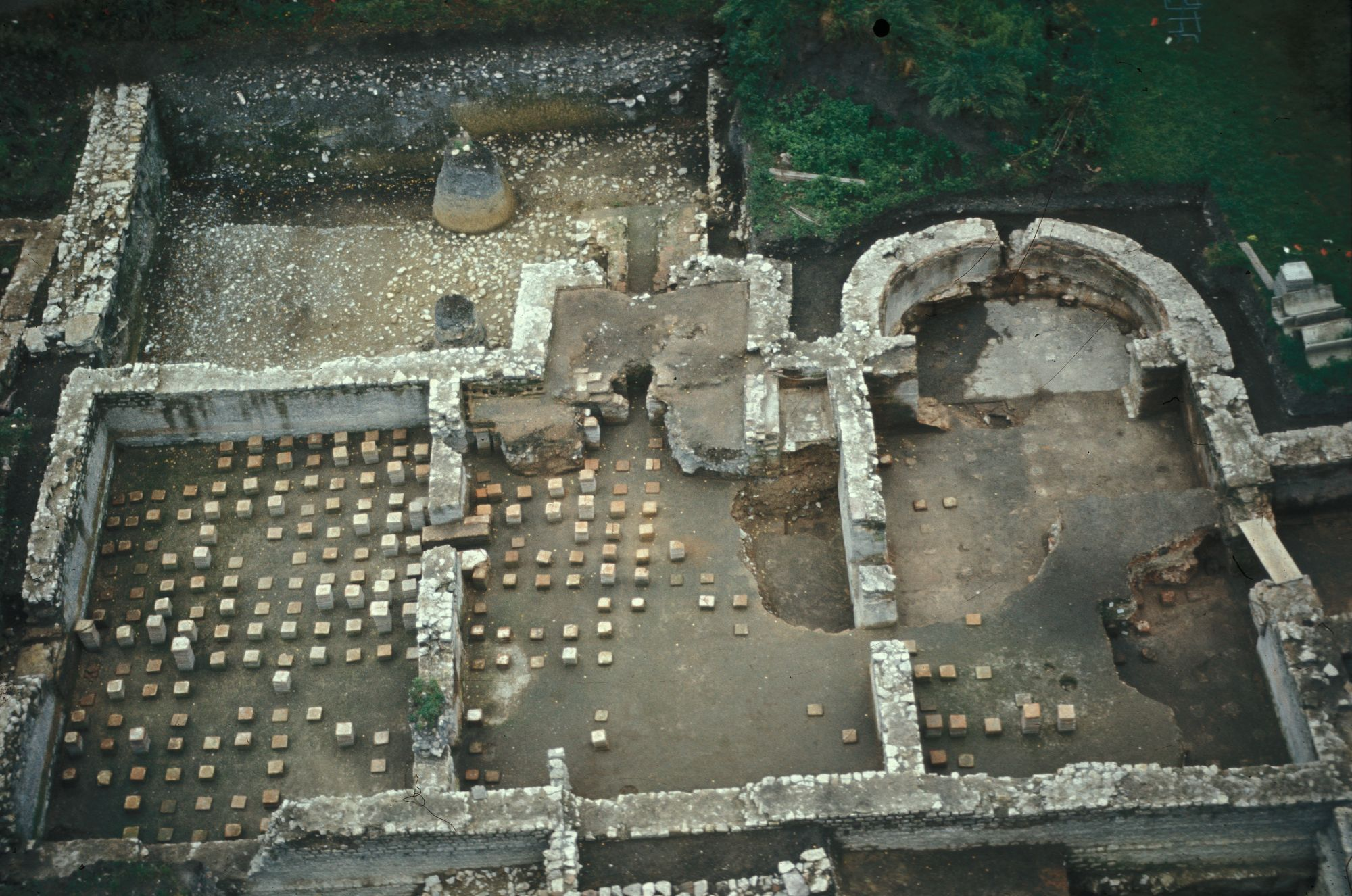 Bild der Ausgrabungen im Jahr 1975